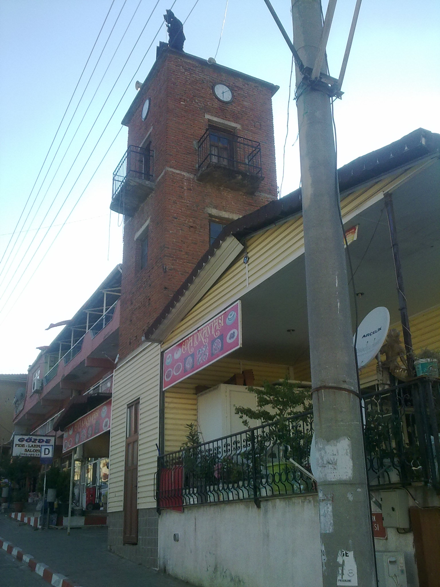 Balya'nın Cumhuriyet Meydanı'ndaki eski saat kulesi.